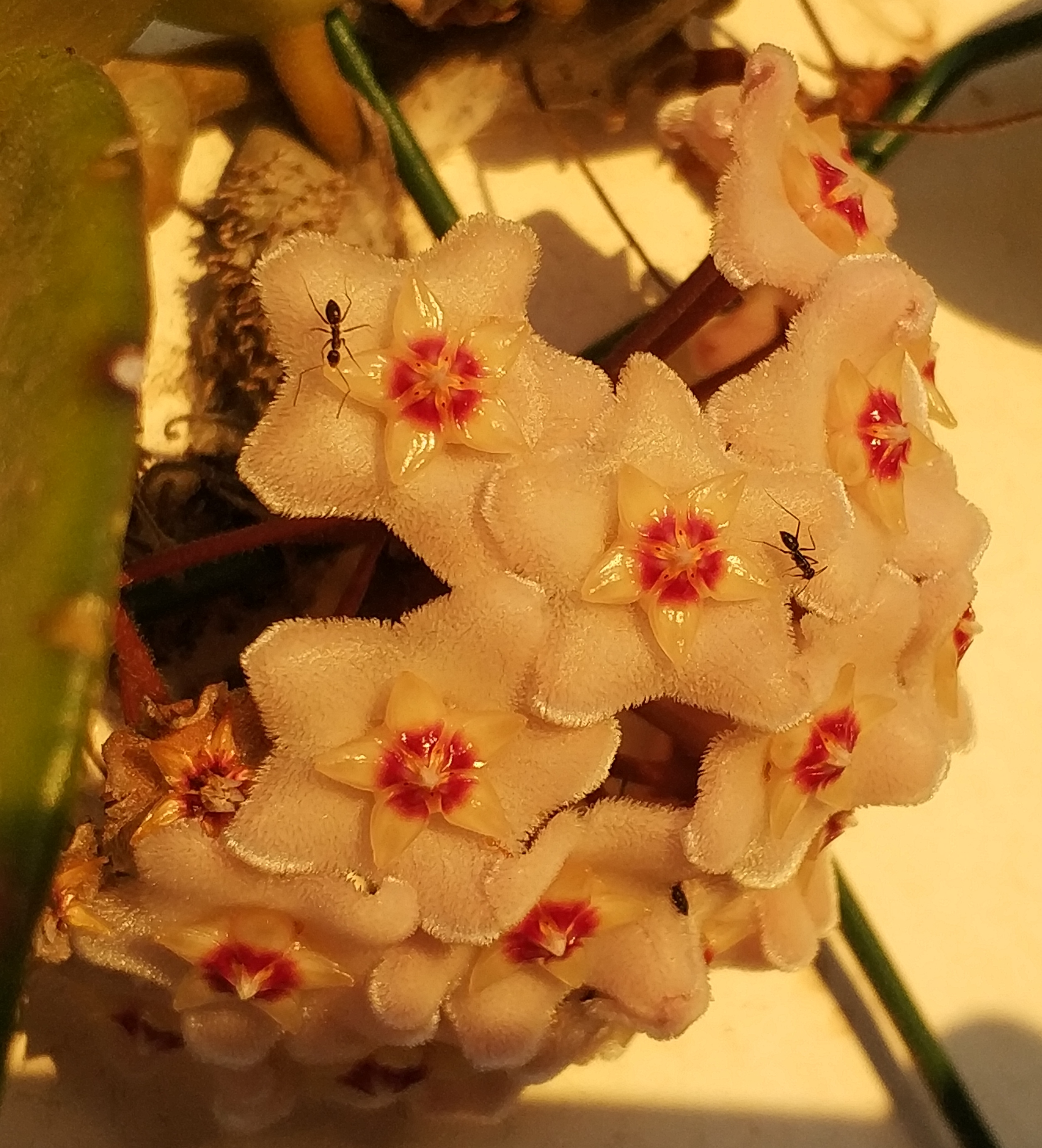 בנאית ישראלית שותה צוף פרחי צמח בת-שבע מטפסת